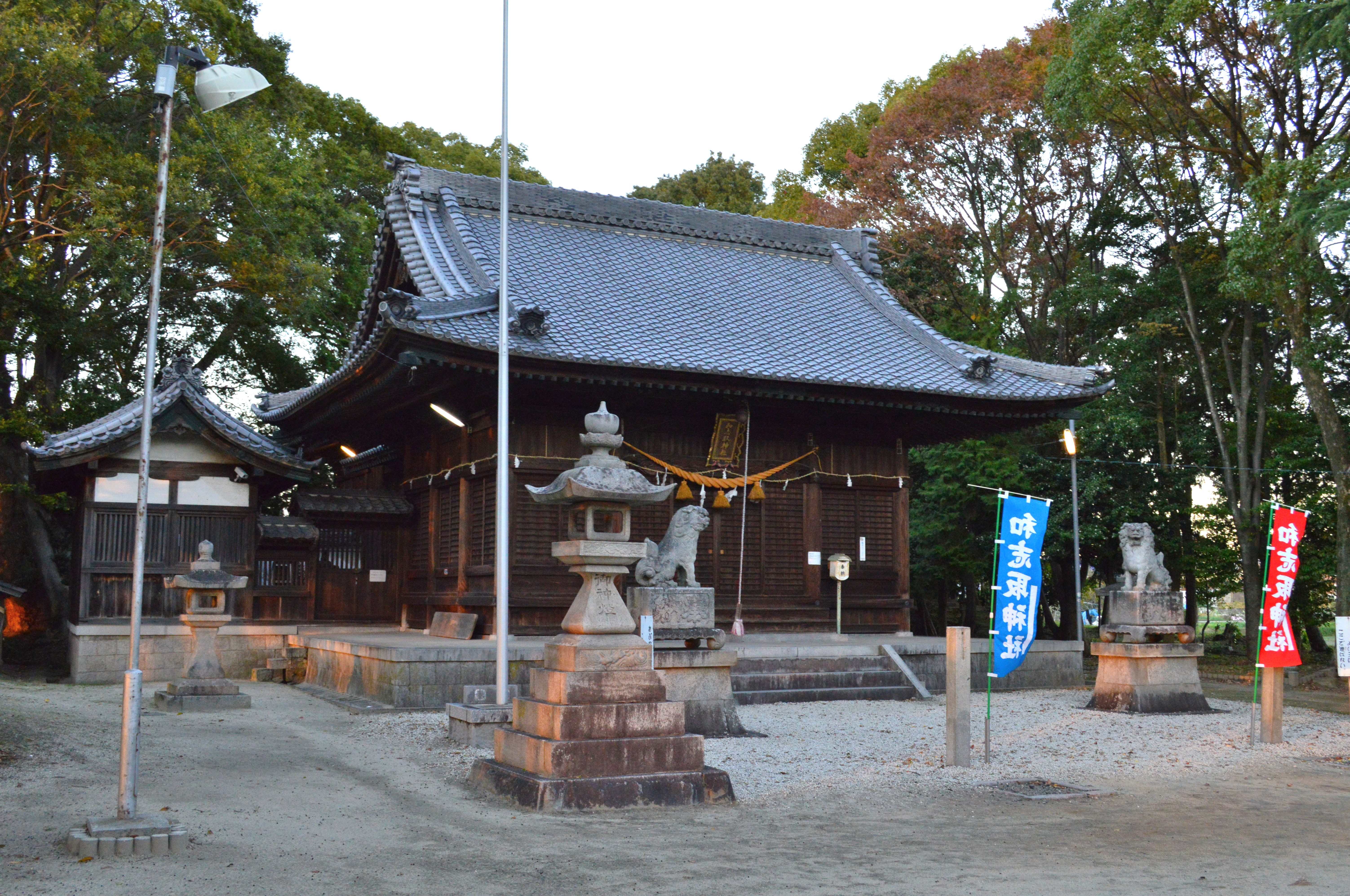 和志取神社 (岡崎市) shaden